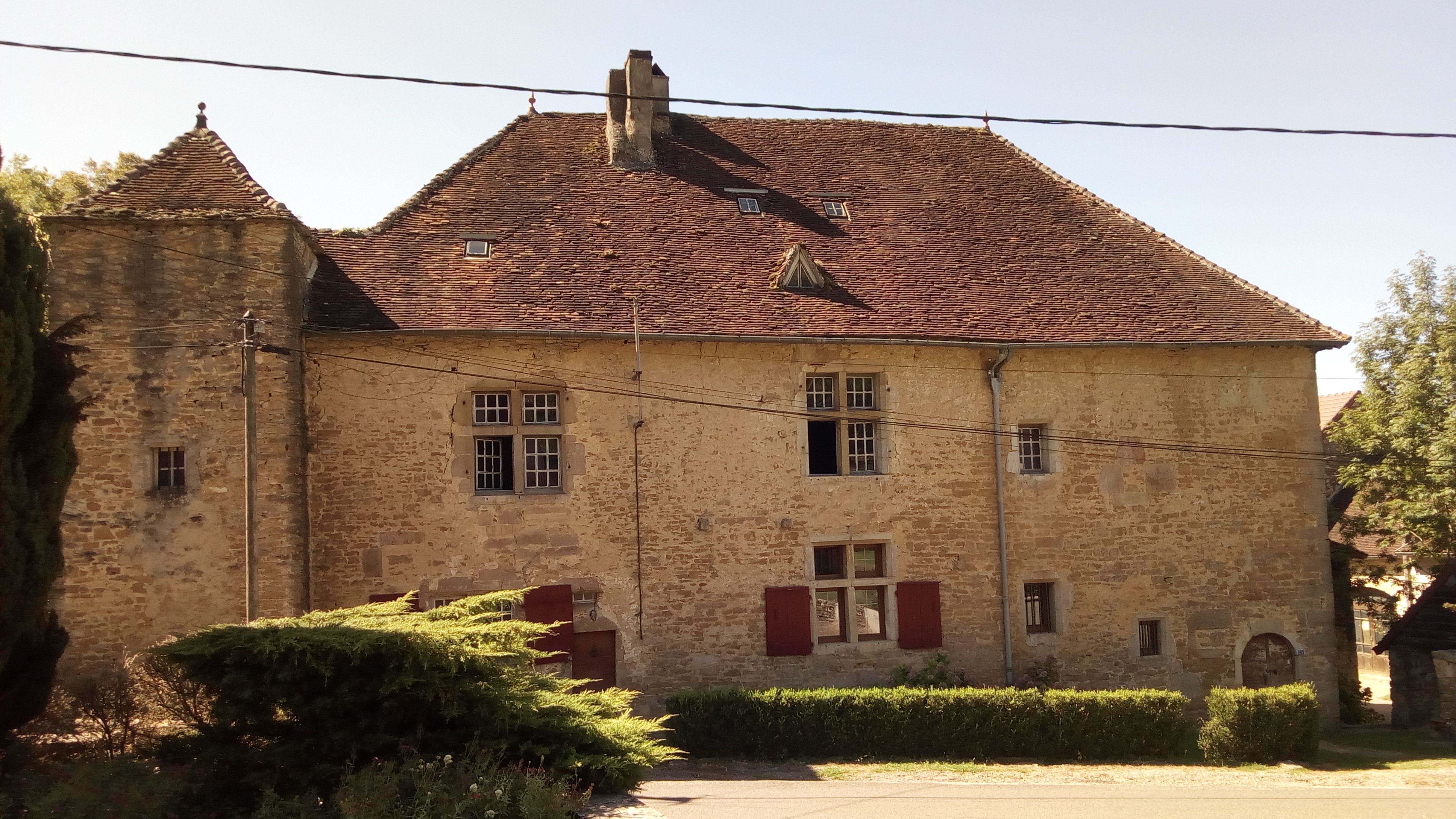 Massif corps de logis cantonné de deux tours de défense. XIVe-XVIIe.